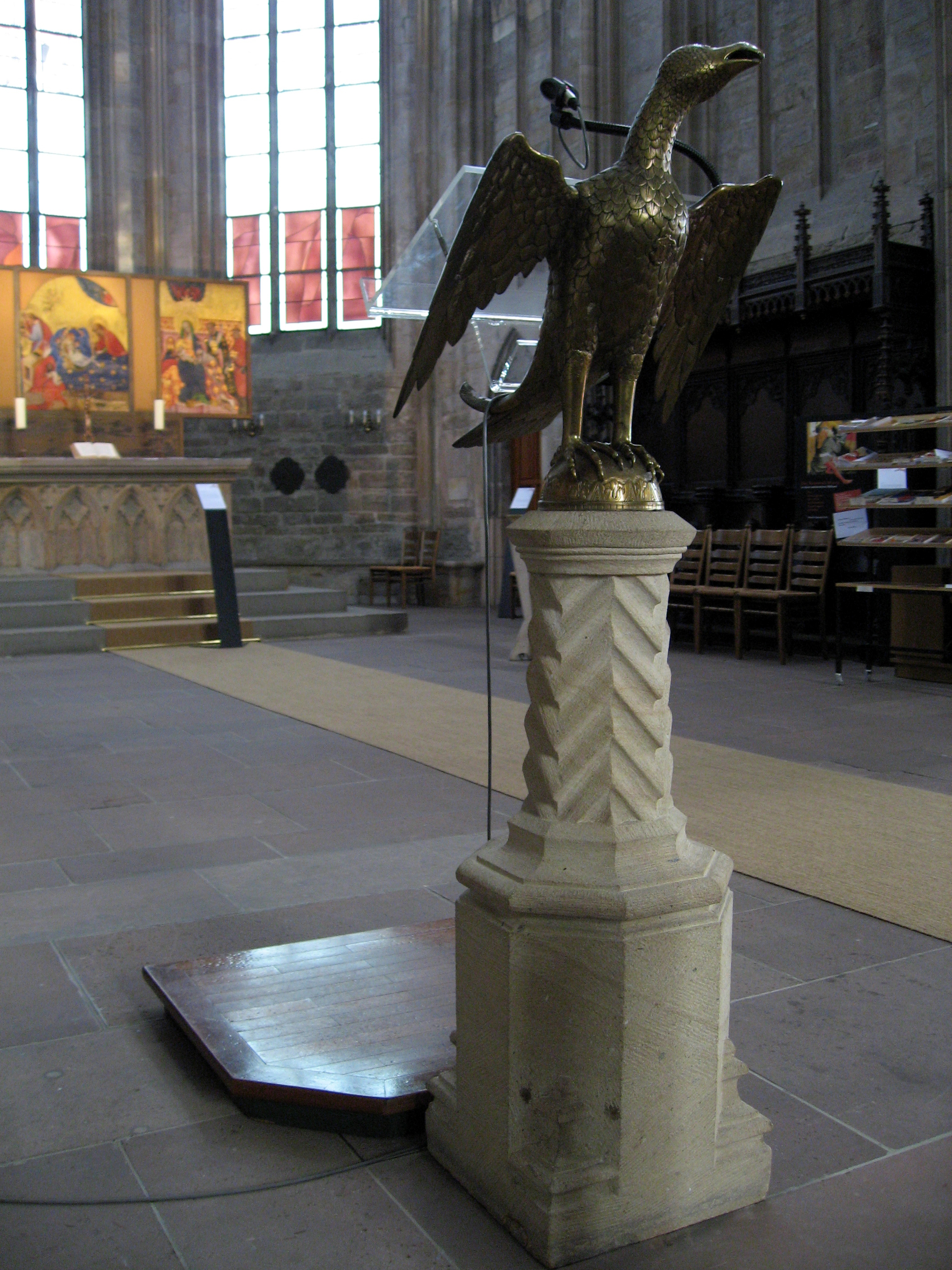 Adlerpult mit Plexiglasauflage